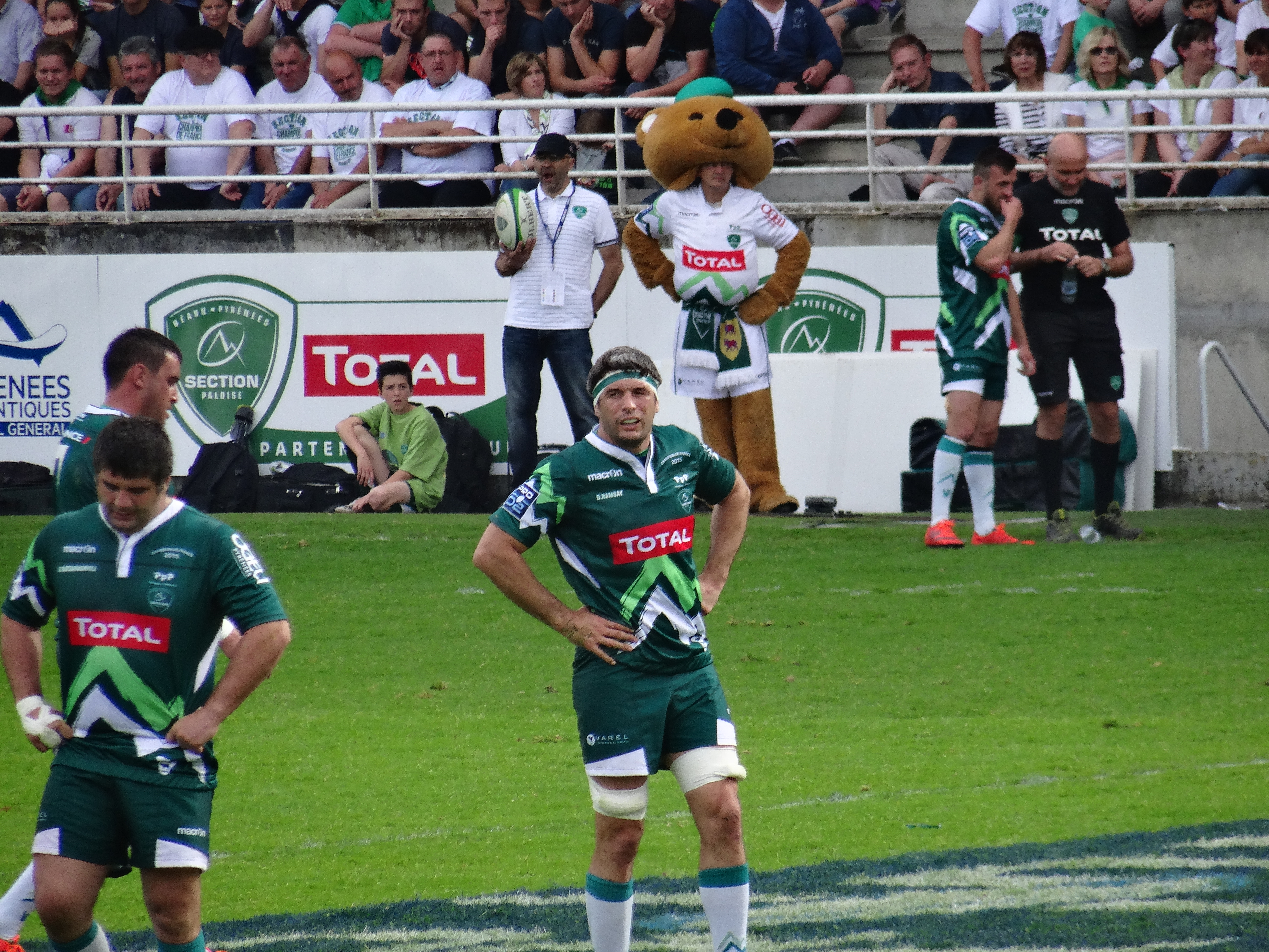 Jean Bouilhou lors de la saison 2014-2015 avec la Section paloise